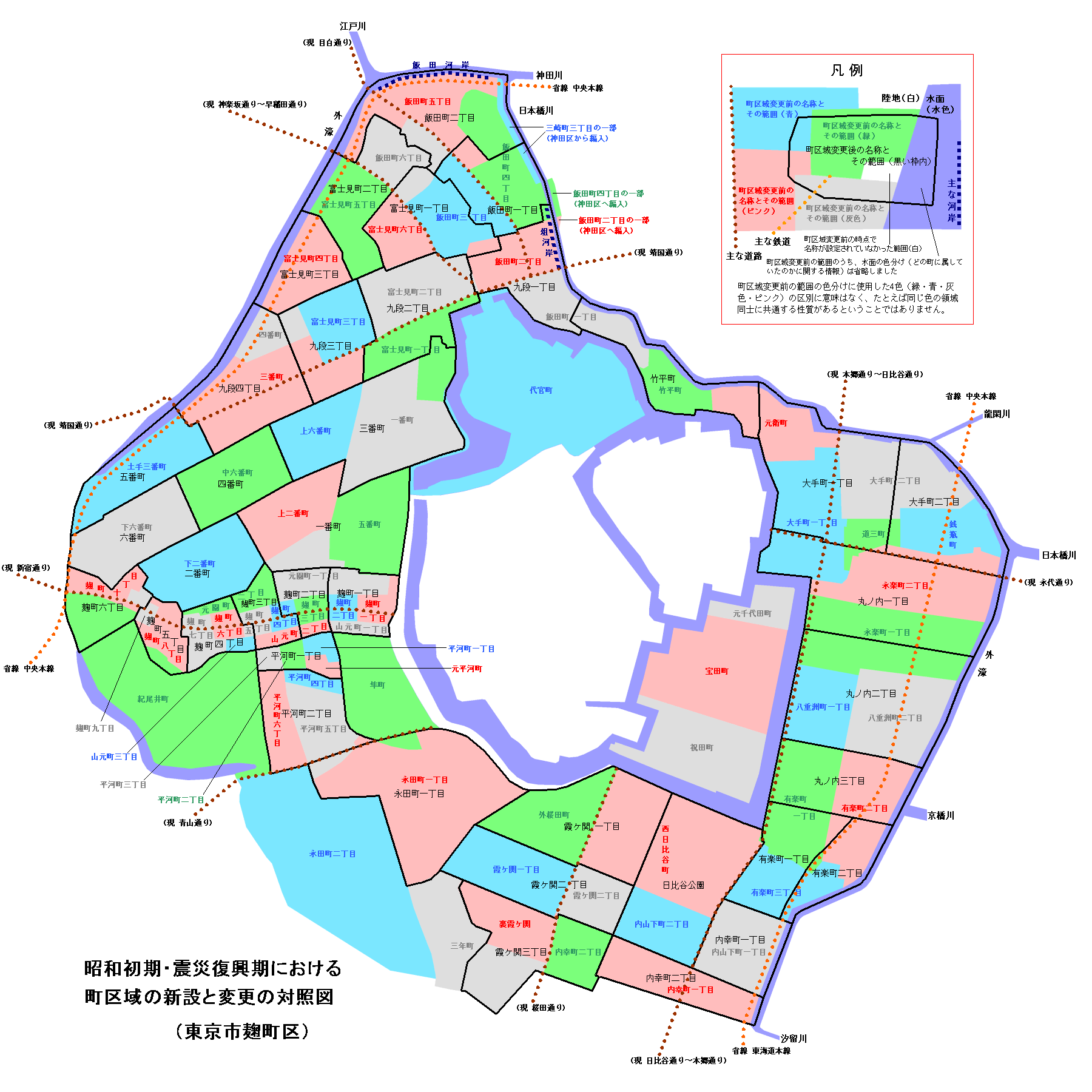 昭和初期・震災復興期における町区域の新設と変更の対照図 東京市麹町区